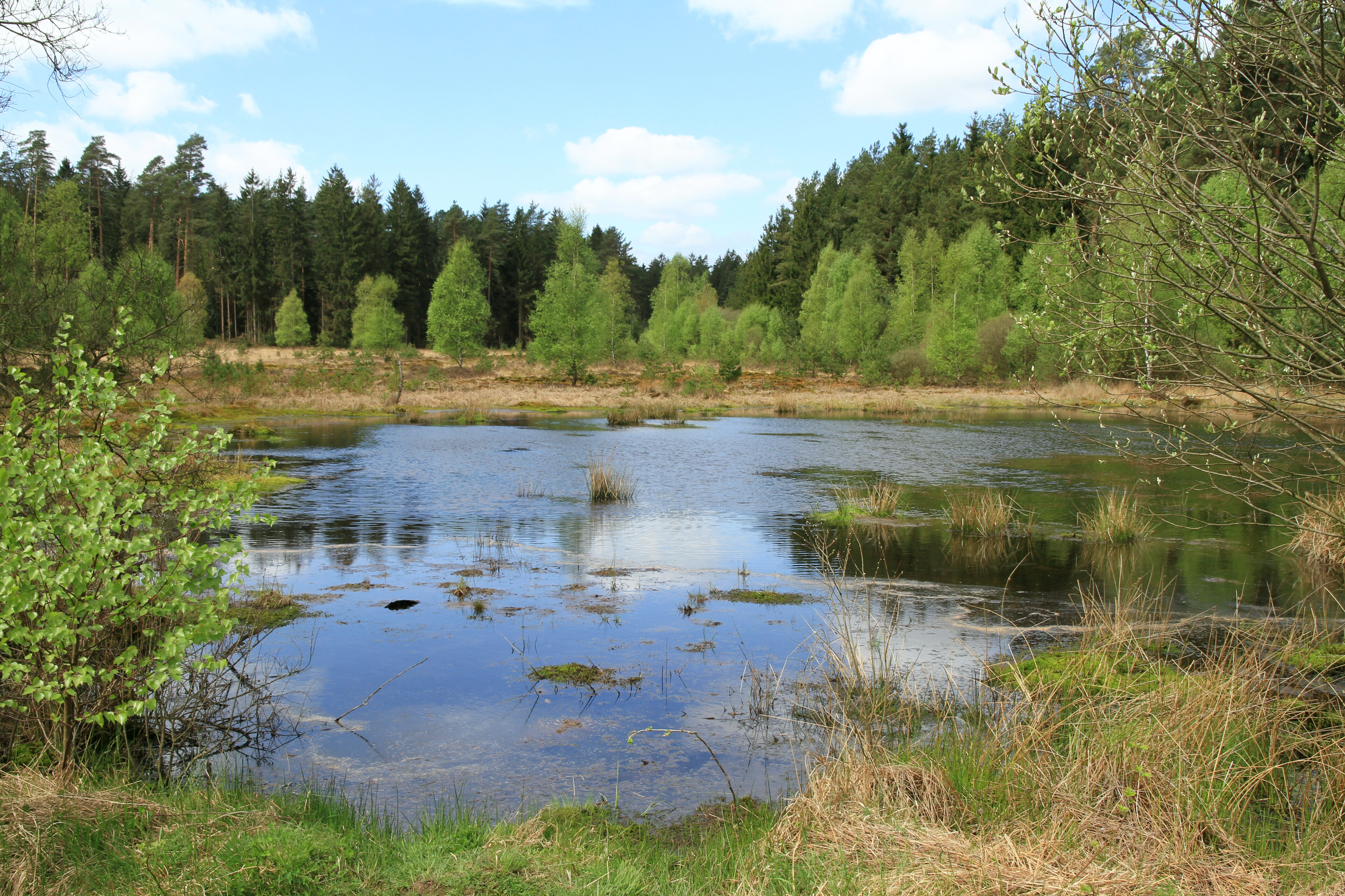 Moorfläche im Naturschutzgebiet Nr: 534014: Franzosenwiesen/Rotes Wasser (Burgwald in Nordhessen zwischen Marburg und Frankenberg)